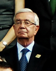 El político español Rafael Anson